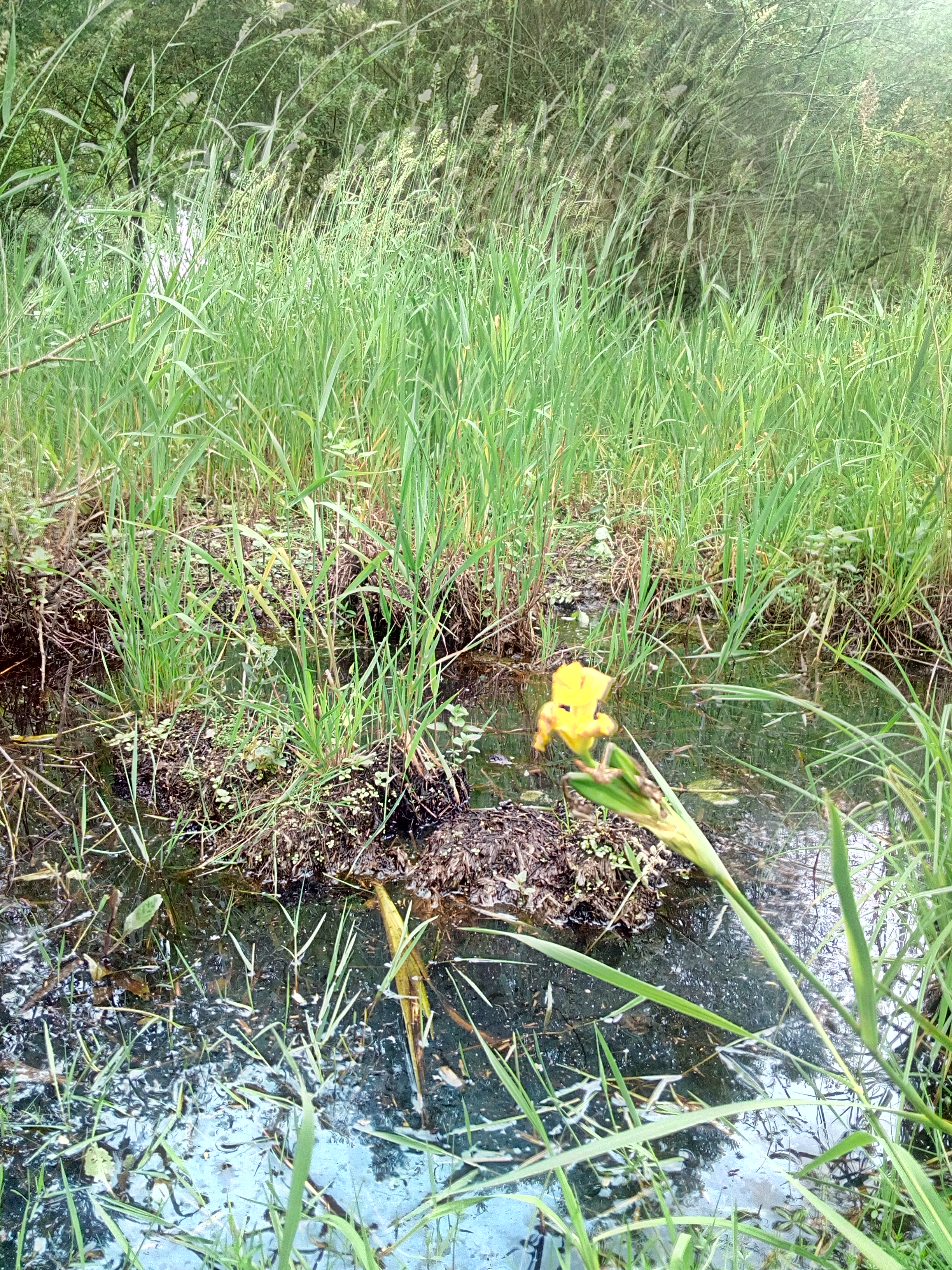 Iris dans le parc naturel régional de Brière à Sainte-Reine-De-Bretagne au lieu nommé par les habitants "port de Sainte-Reine-De-Bretagne"